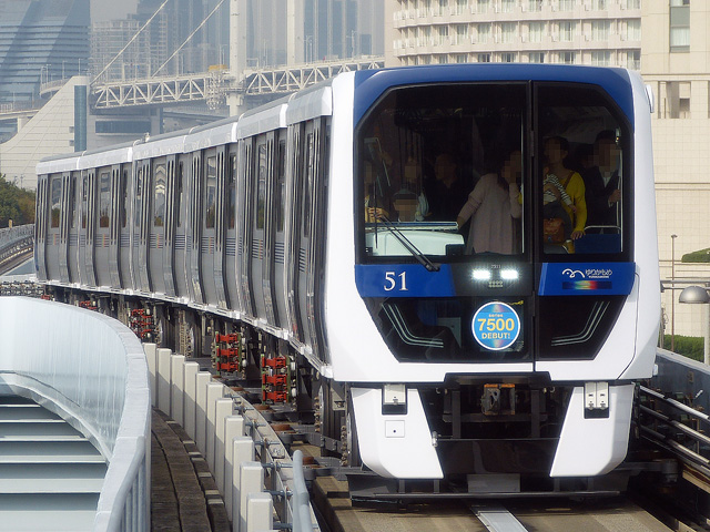 ゆりかもめ7500系車両 Panasonic Lumix DMC-FZ150